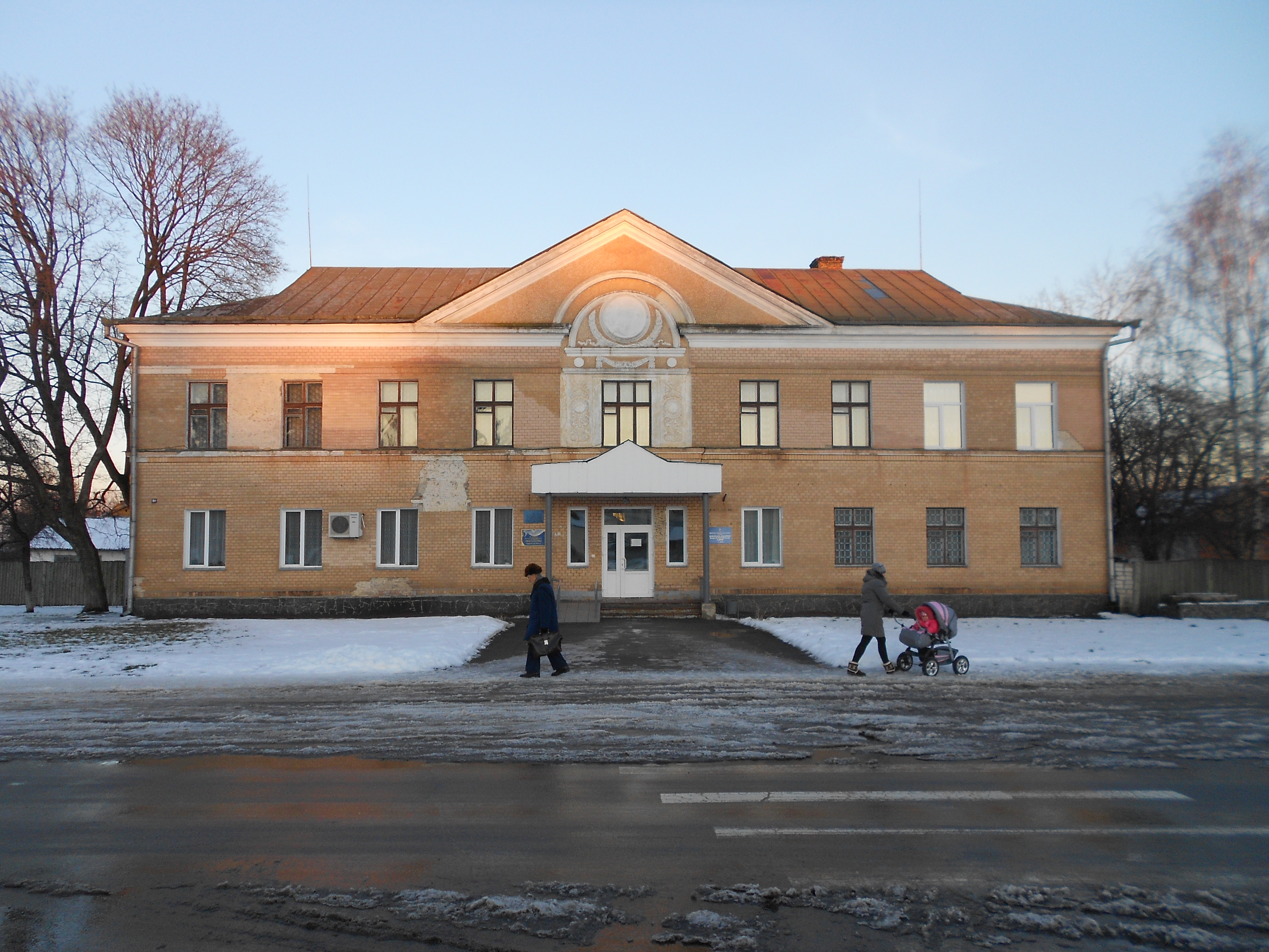 Приміщення місцевої газети. Смт Ріпки Чернігівської області.